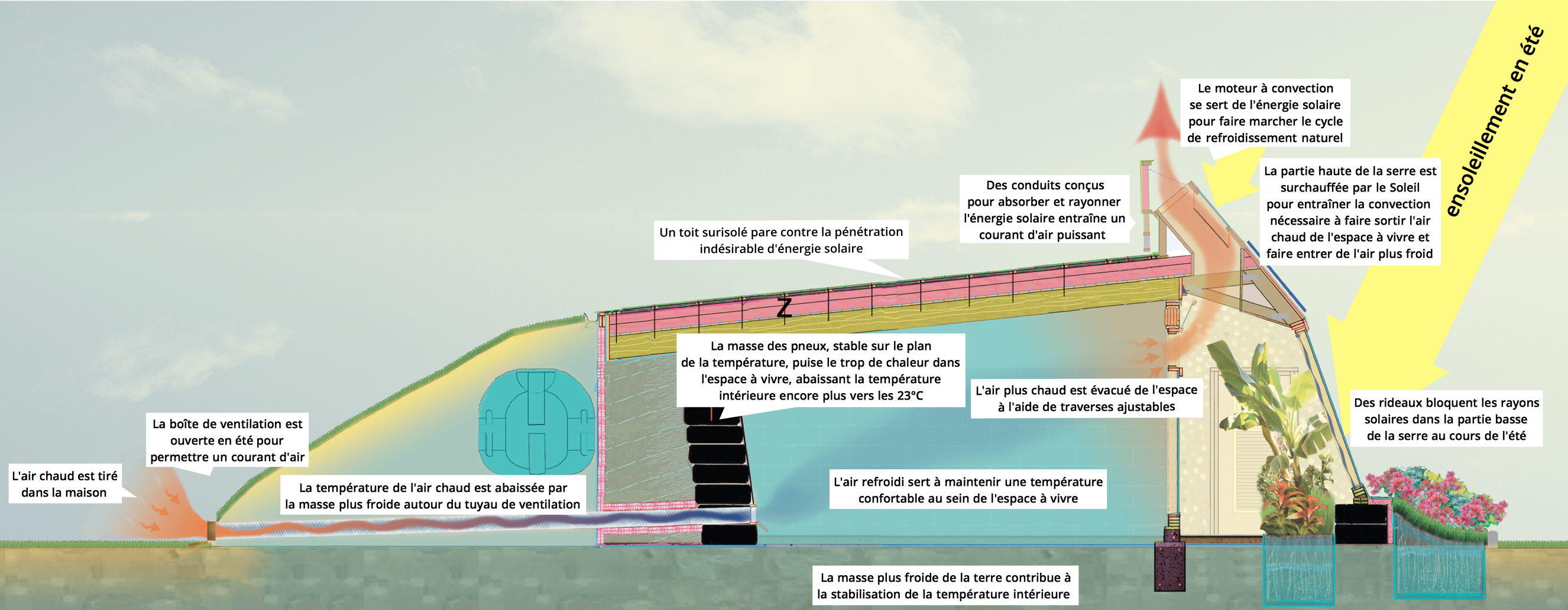 Système de ventilation et refroidissement d'un géonef/earthship.